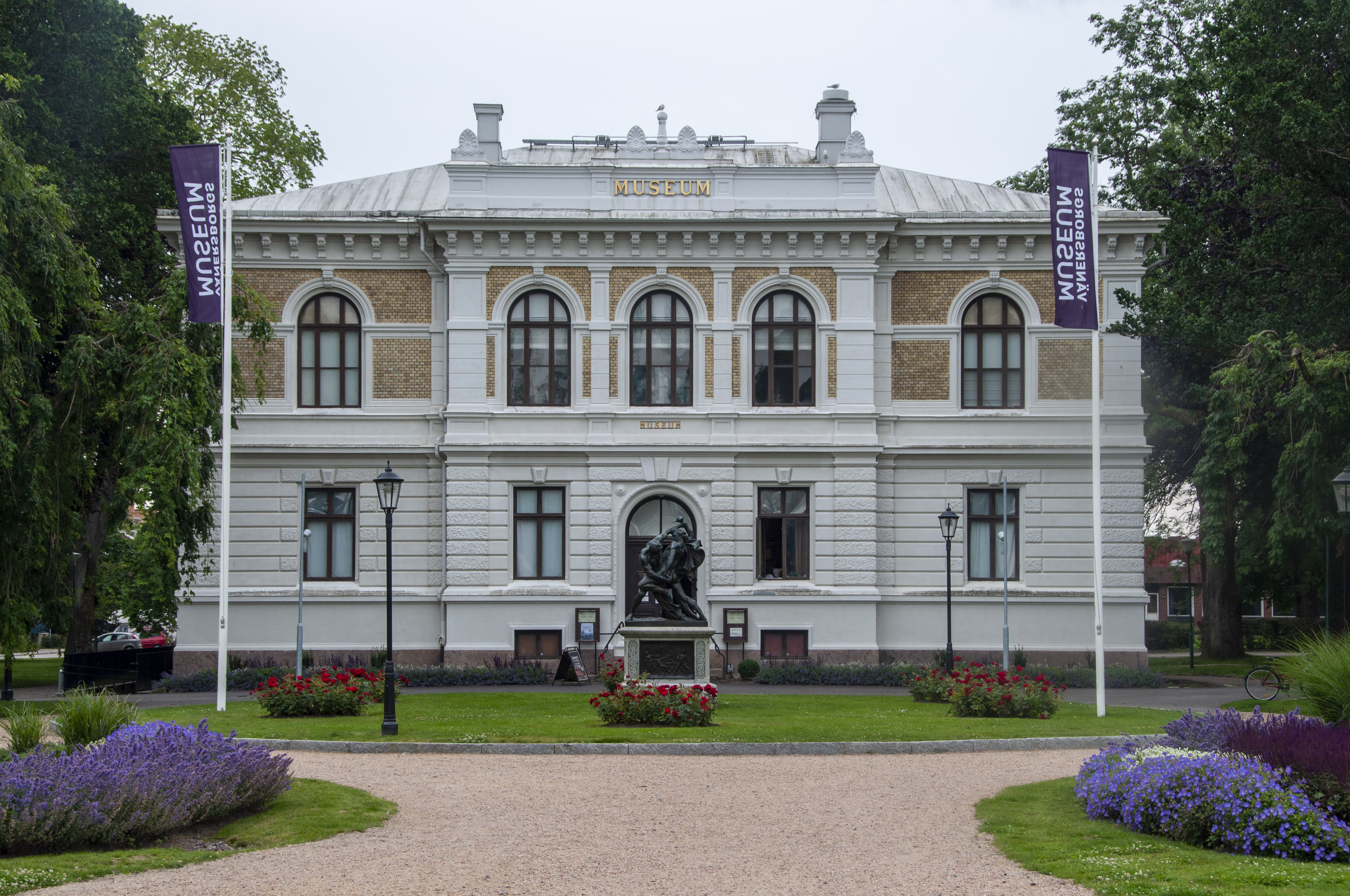 Vänersborgs Museum, uppfört 1885 efter arkitekten August Krügers ritningar.